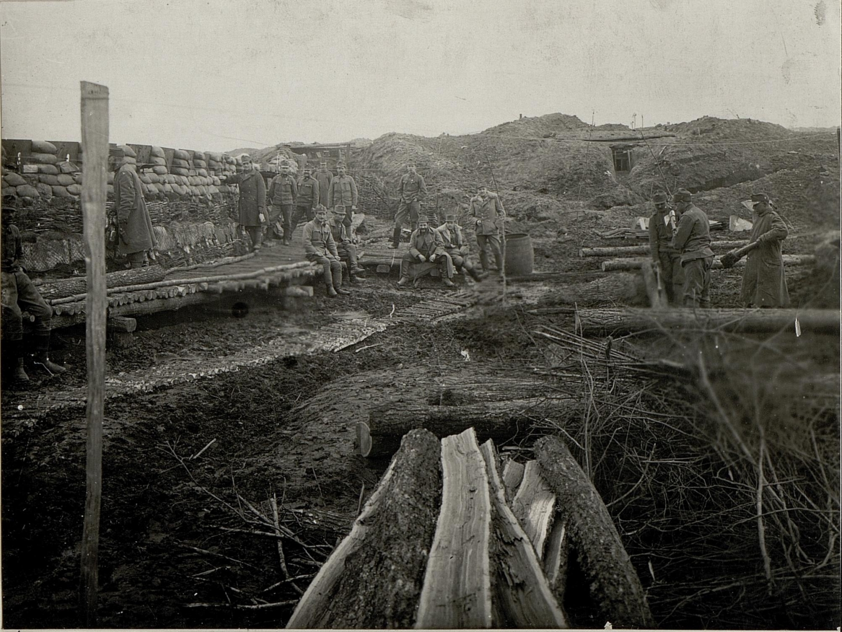 Vermutlich eine Fotostrecke einer Honvedeinheit mit Einsatzgebiet in Galizien